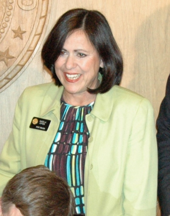 Colorado State Senator Angela Giron.